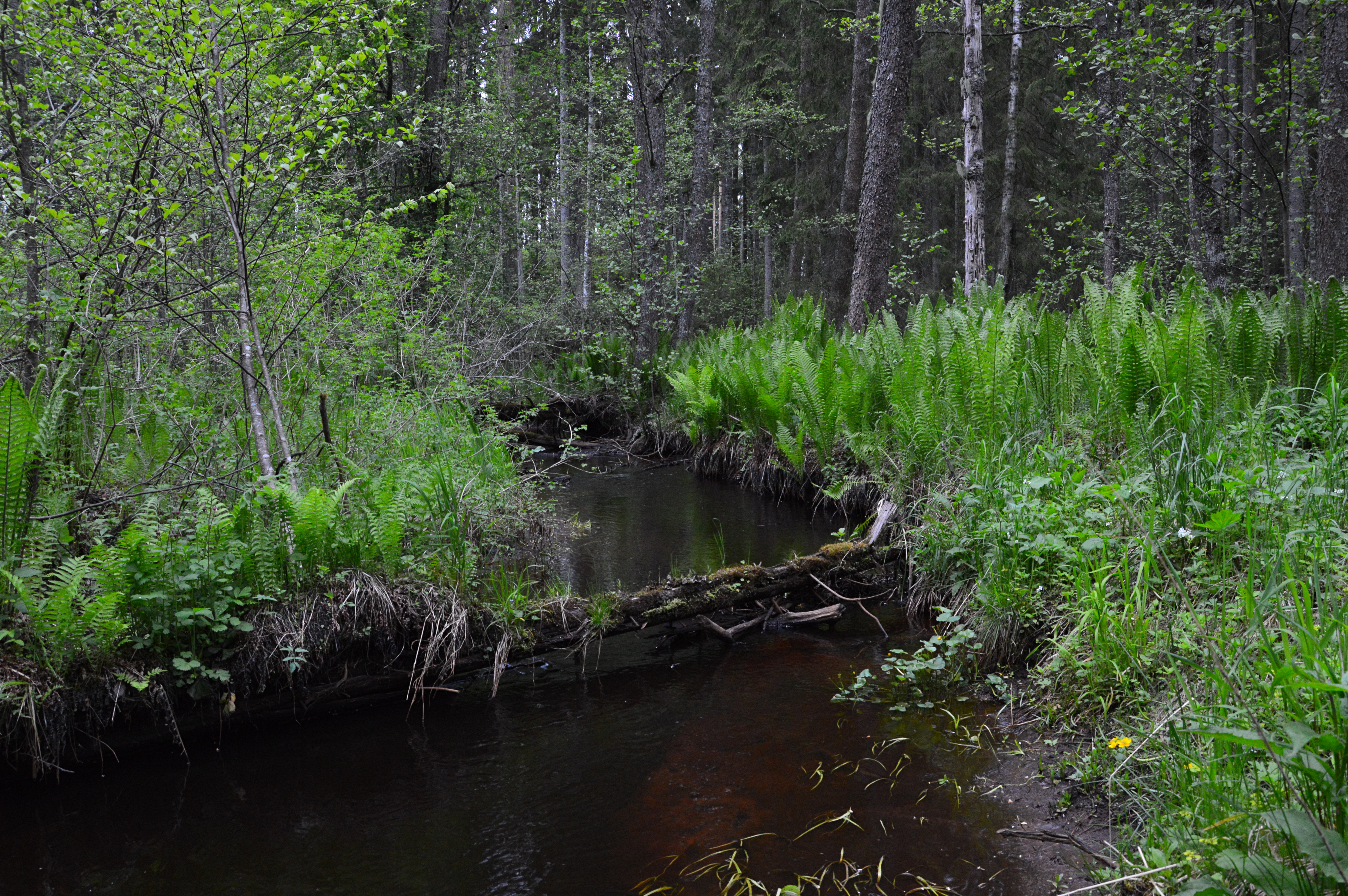 Rebasmäe oja Rebasmäe allika lähedal.